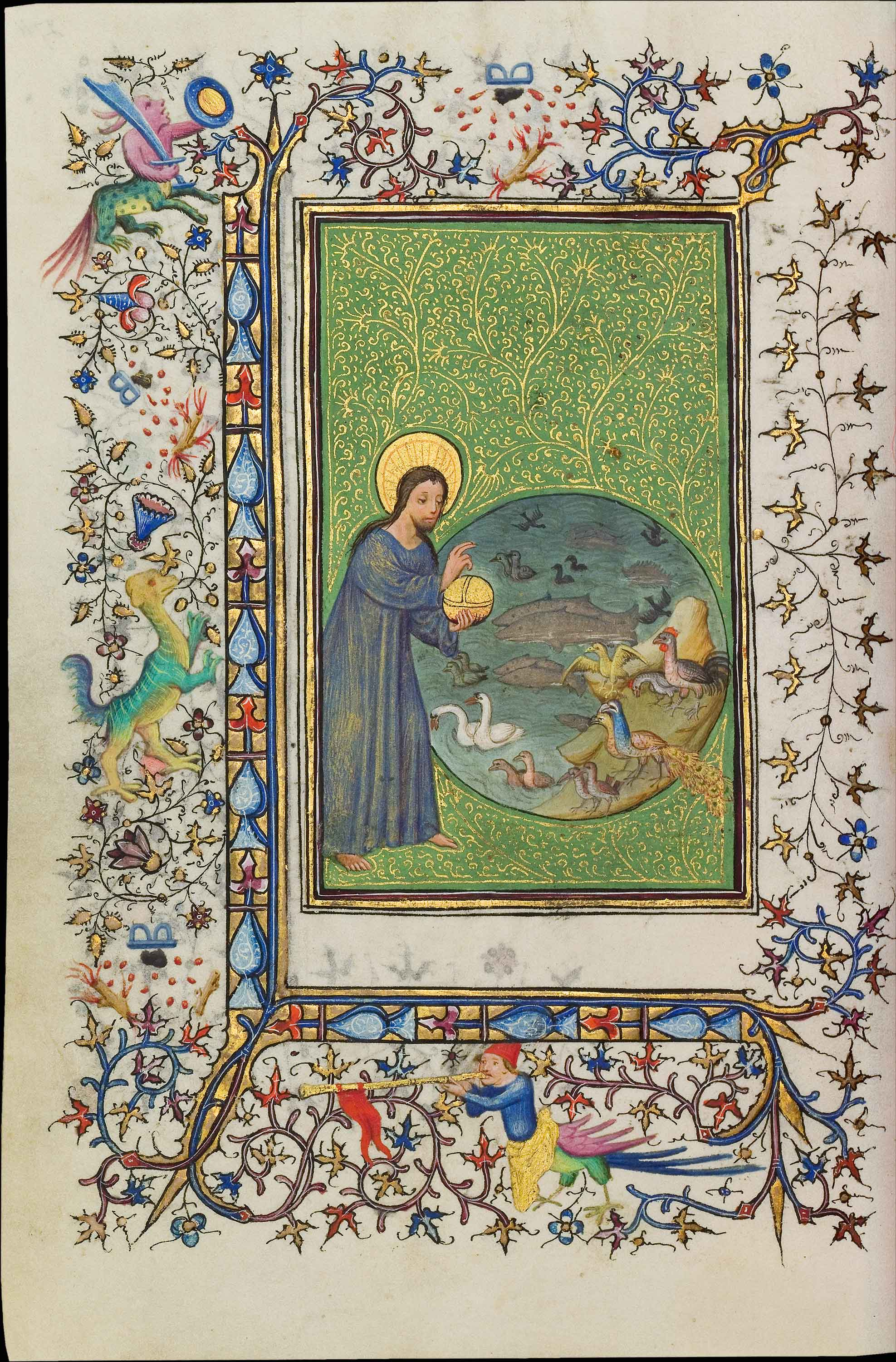 Dieu crée les oiseaux et les poissons. Heures dites de Joseph Bonaparte.